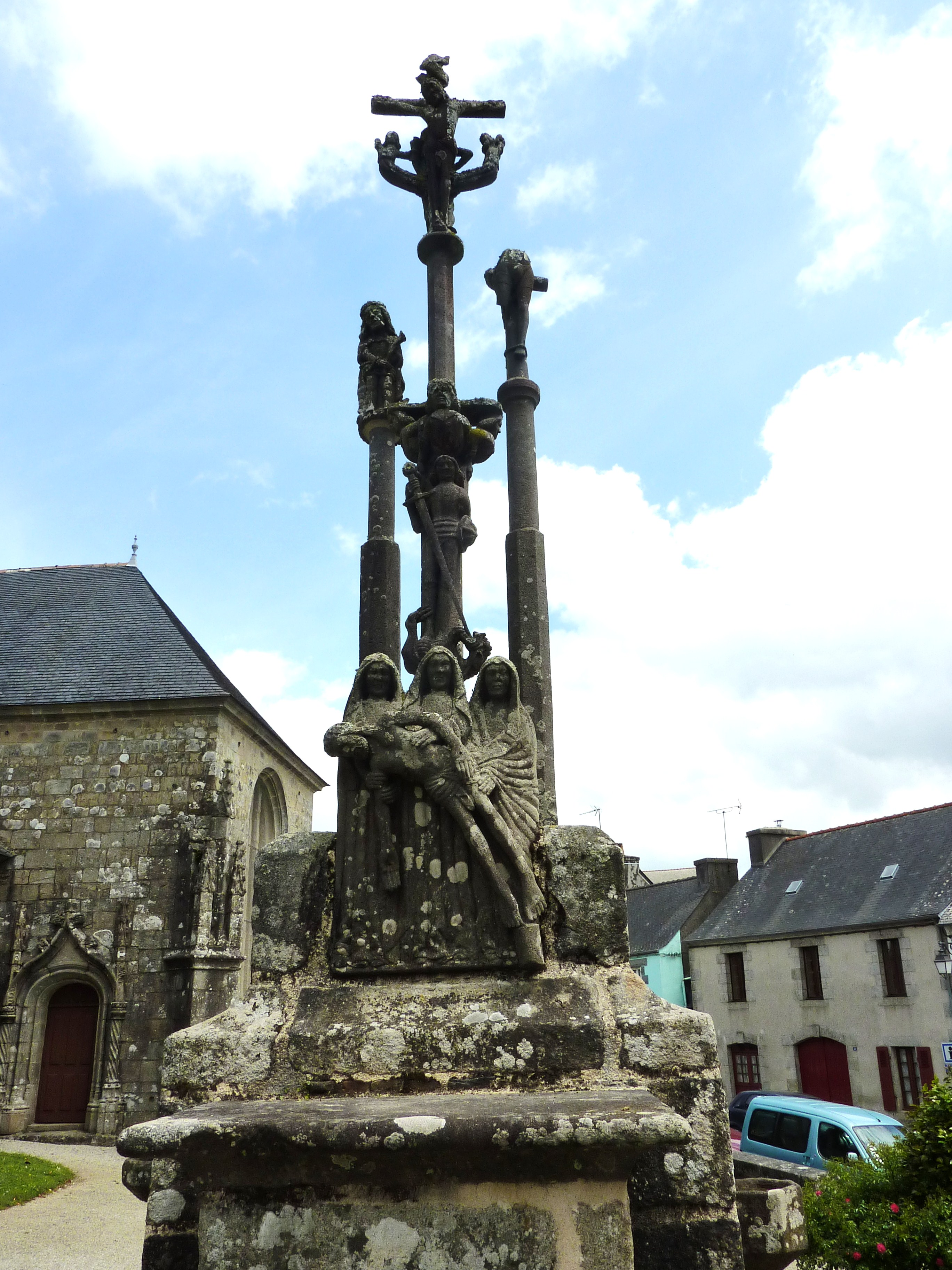 Brasparts: le calvaire du XVIème siècle